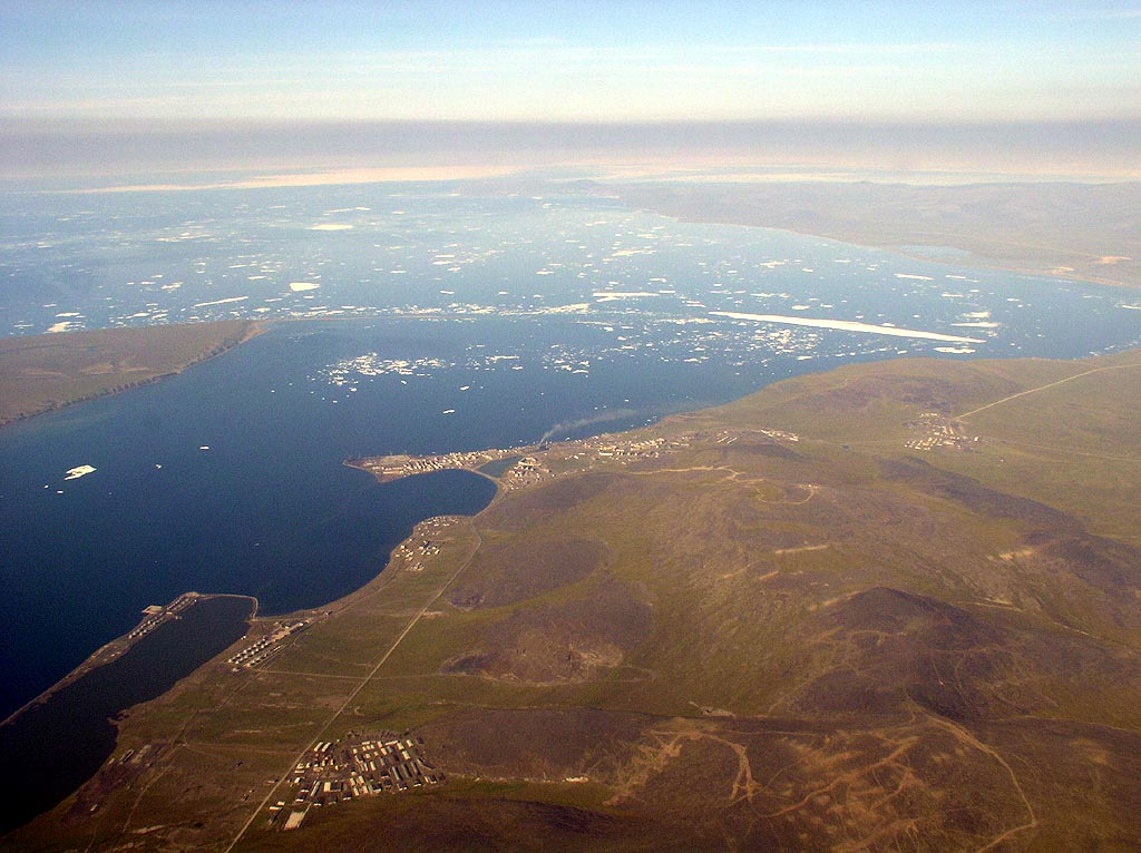 красота